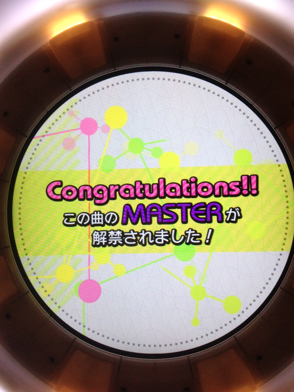 maimai GreeNにてMASTERを解禁したことを表す画面